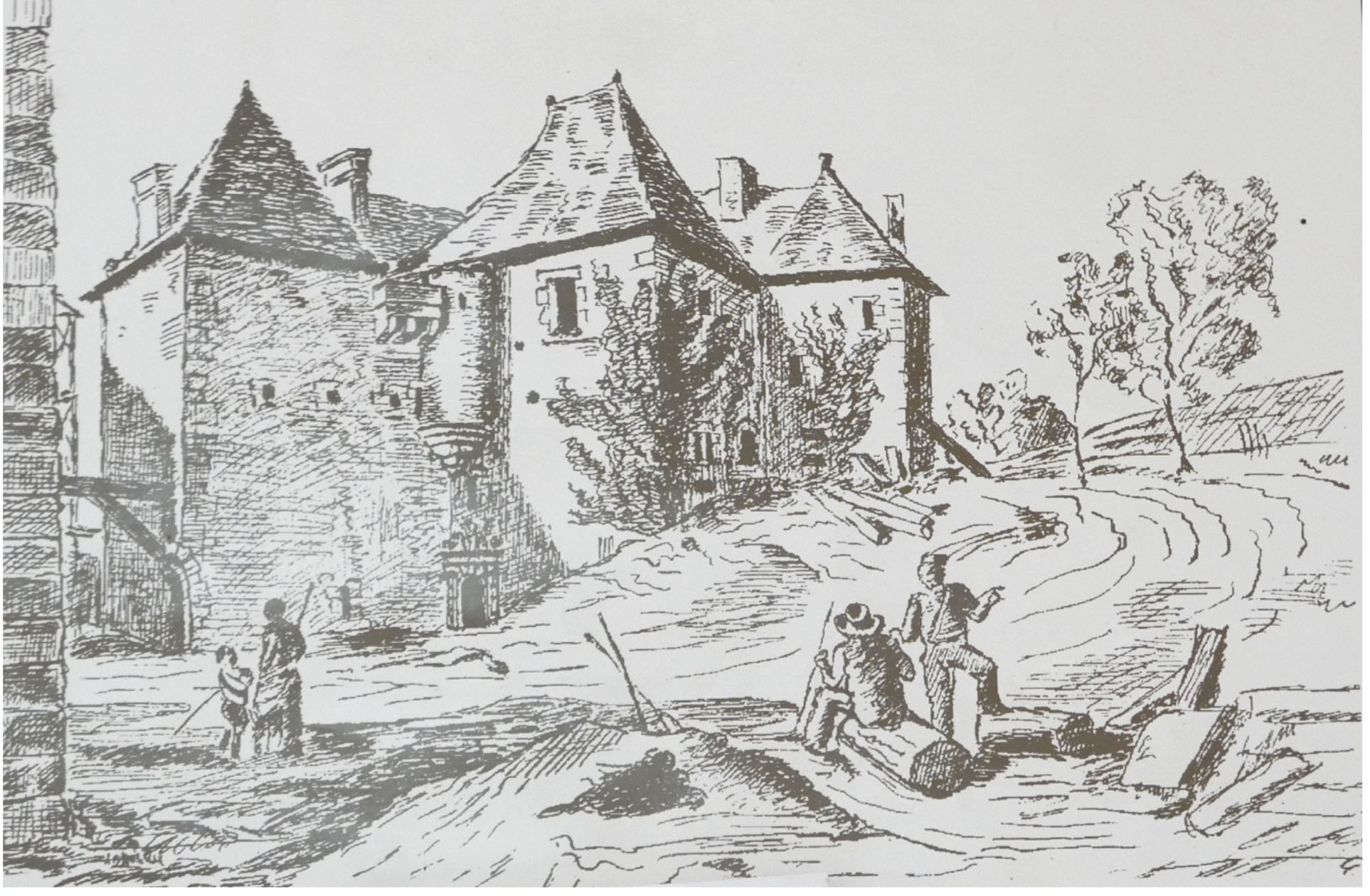 Vue arrière du Chateau de Marval - Gravure de Jules de Verneilh (XIXe siècle)